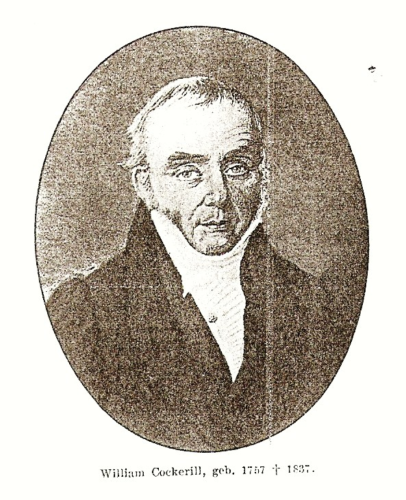 Scan einer in Maccos Buch abgedruckten Ablichtung eines Portraits aus dem Familienbesitz